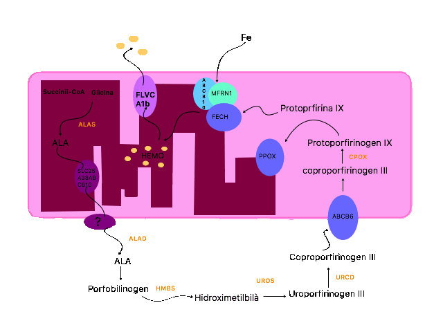 sintesi grup hemo partir de PG